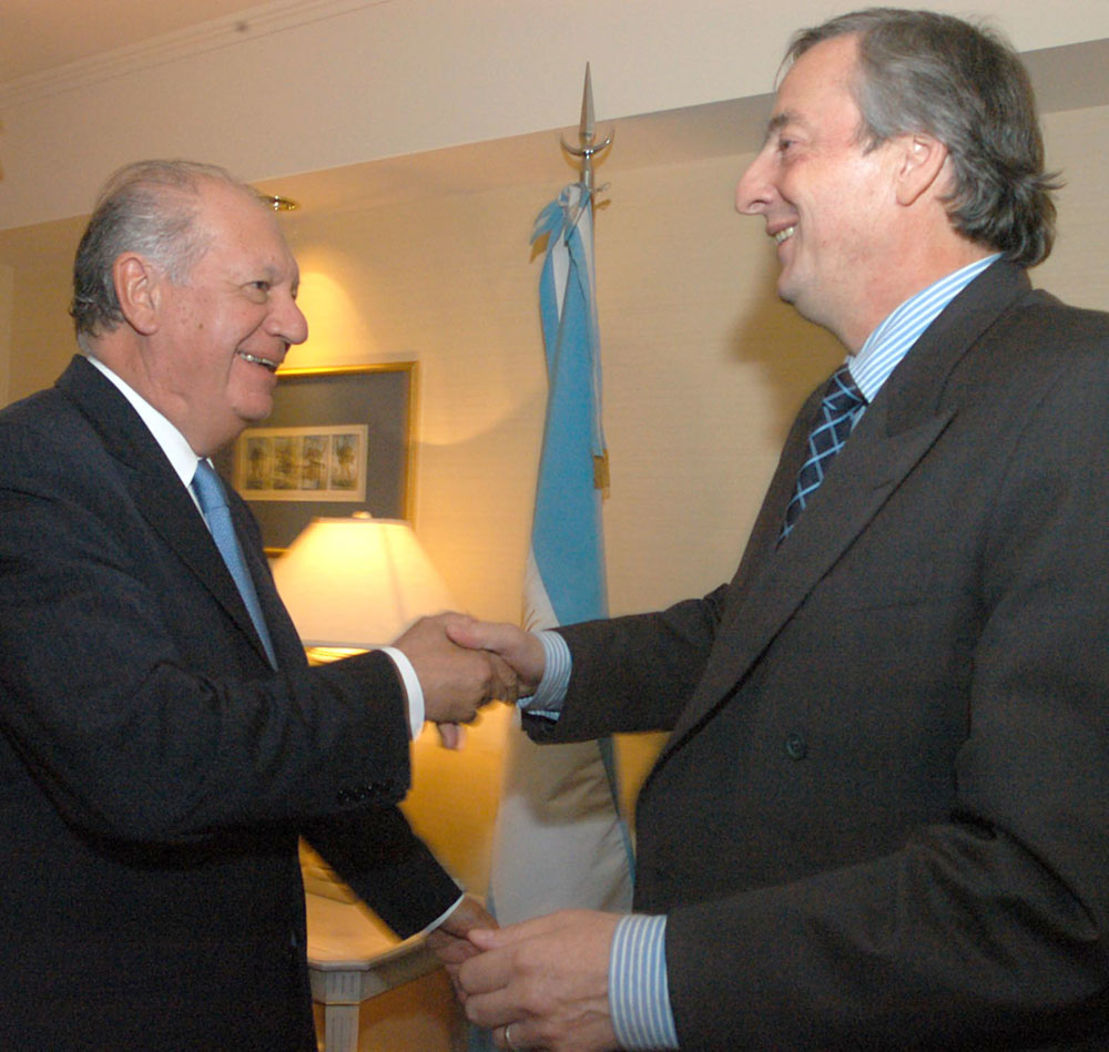 Misiones - El presidente Néstor Kirchner se reunió con su par de Chile, Ricardo Lagos.